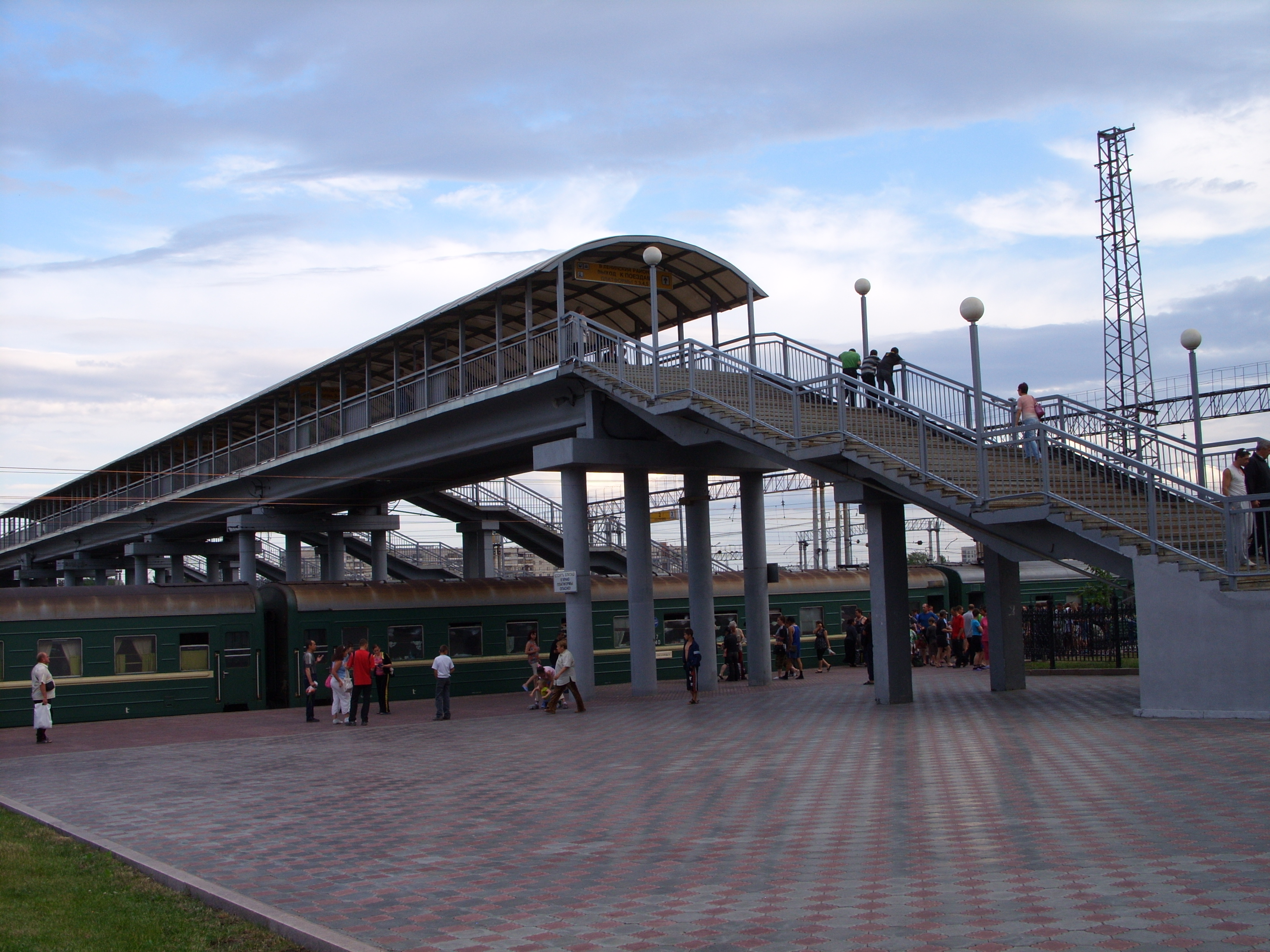 снимки июля 2009 г.